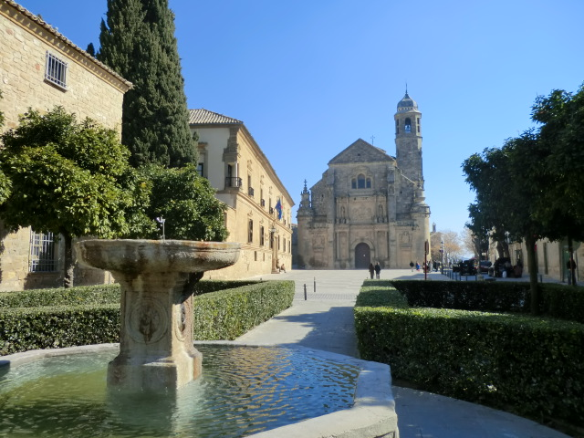 Plaza Vázquez de Molina - Úbeda (Jaén)